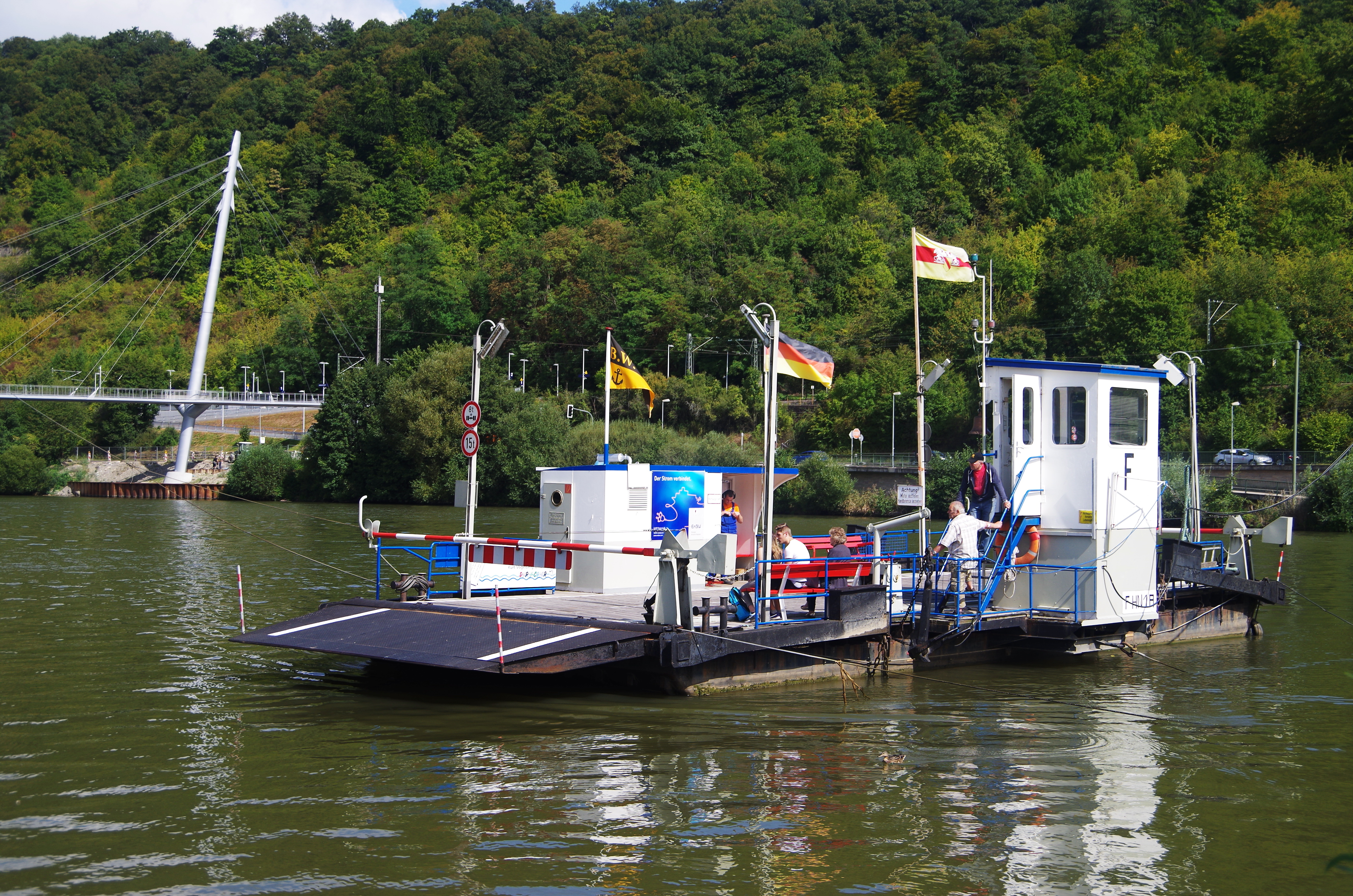 Kettenfähre Haßmersheim, im Hintergrund Neckarsteg